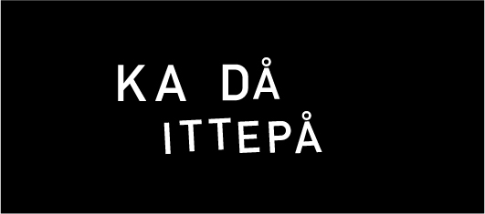 Logo for kampanjen KA DÅ ITTEPÅ, som del av prosjektet Stavanger2018.